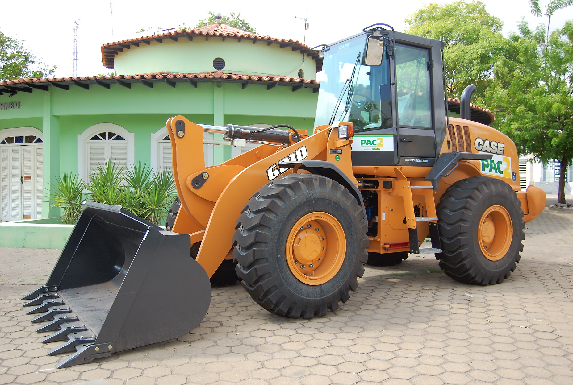 Trator exposto em praça pública, adquerido pela Prefeitura de Campo Maior (Piauí) através do PAC 2